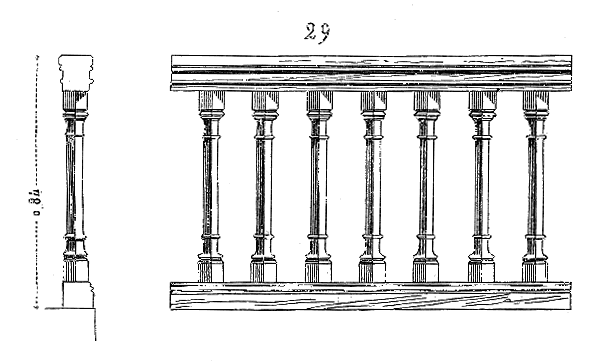 Balustrade de l'église de Flavigny. Issu du Dictionnaire raisonné de l'architecture française du XIe au XVIe siècle, par Eugène Viollet-Le-Duc.